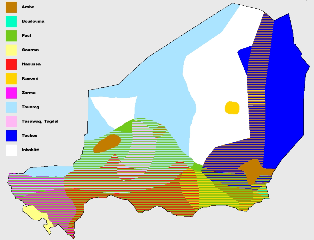 Répartition géographique des langues nationales du Niger.